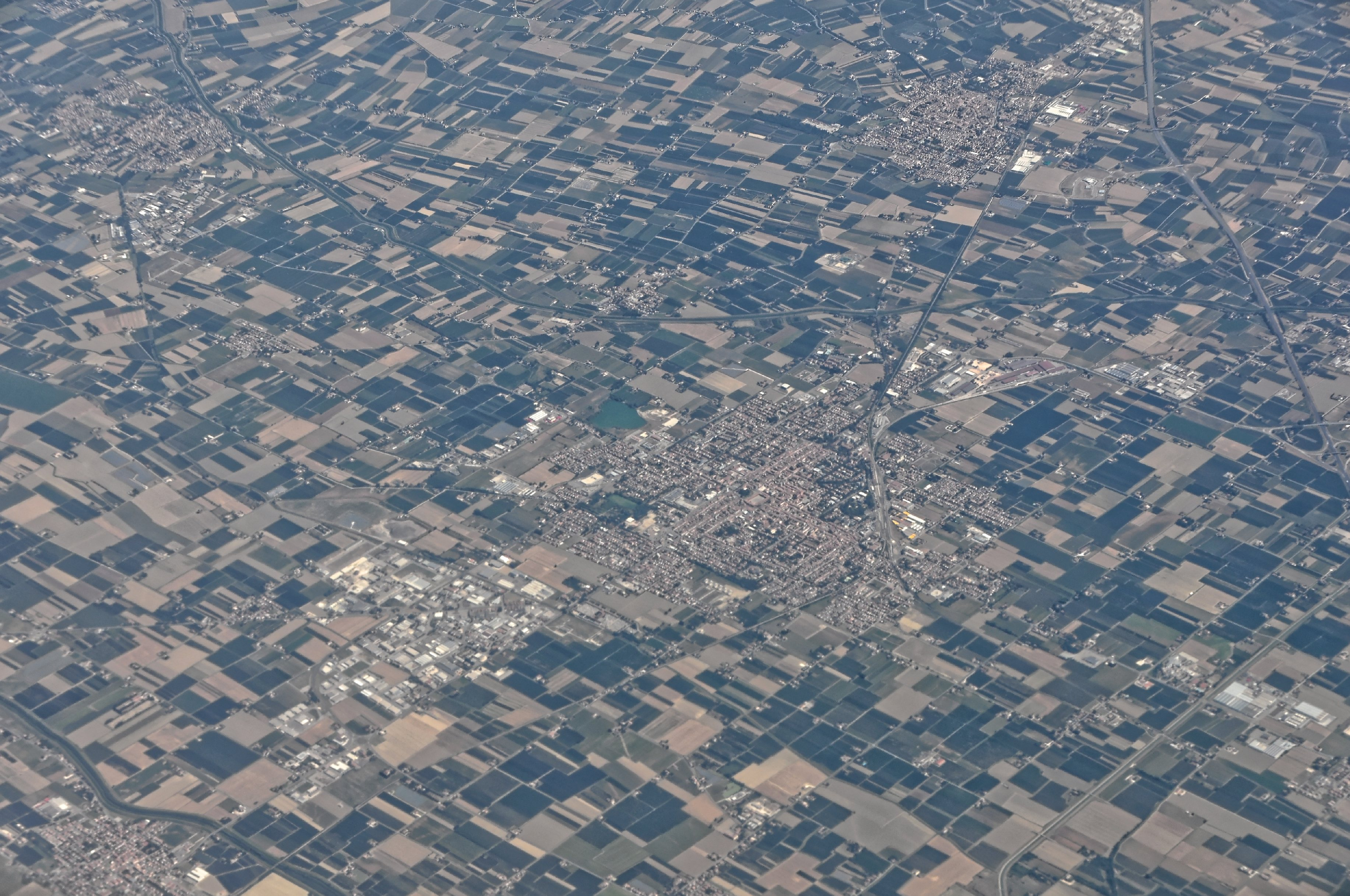 Bilder vom Flug -Rom-Düsseldorf-Hamburg 2013 Dieses Foto entstand in Zusammenarbeit mit Stadtbesichtigungen.de Die Seiten Stadtbesichtigungen.de, der dazugehörige Reise Blog sowie die Facebookseite: Stadtbesichtigungen Rom dürfen dieses Bild für Ihre Veröffentlichungen ohne den Hinweis auf Wikipedia, Commons bzw der Lizenz verwenden. Die Verantwortlichen habe von mir (Ra Boe) die Originaldaten zur freien Verfügung übermittelt bekommen.